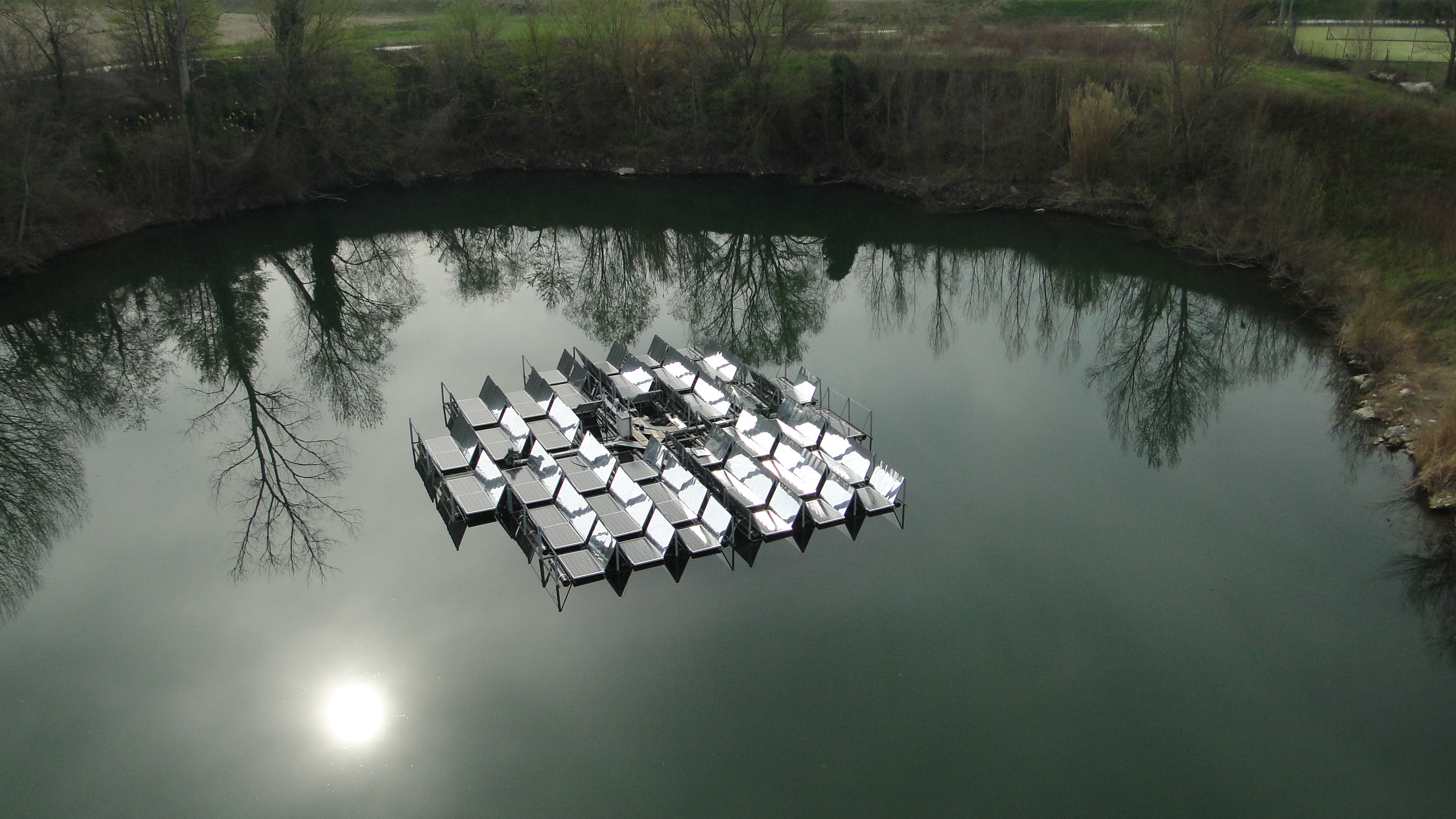 Colignola - Italia. Impianto flottante con tracking, cooling e riflettori. Impianto flottante con inseguitore solare, sistema di raffreddamento e specchi riflettori per concentrare le radiazioni solari incidenti.